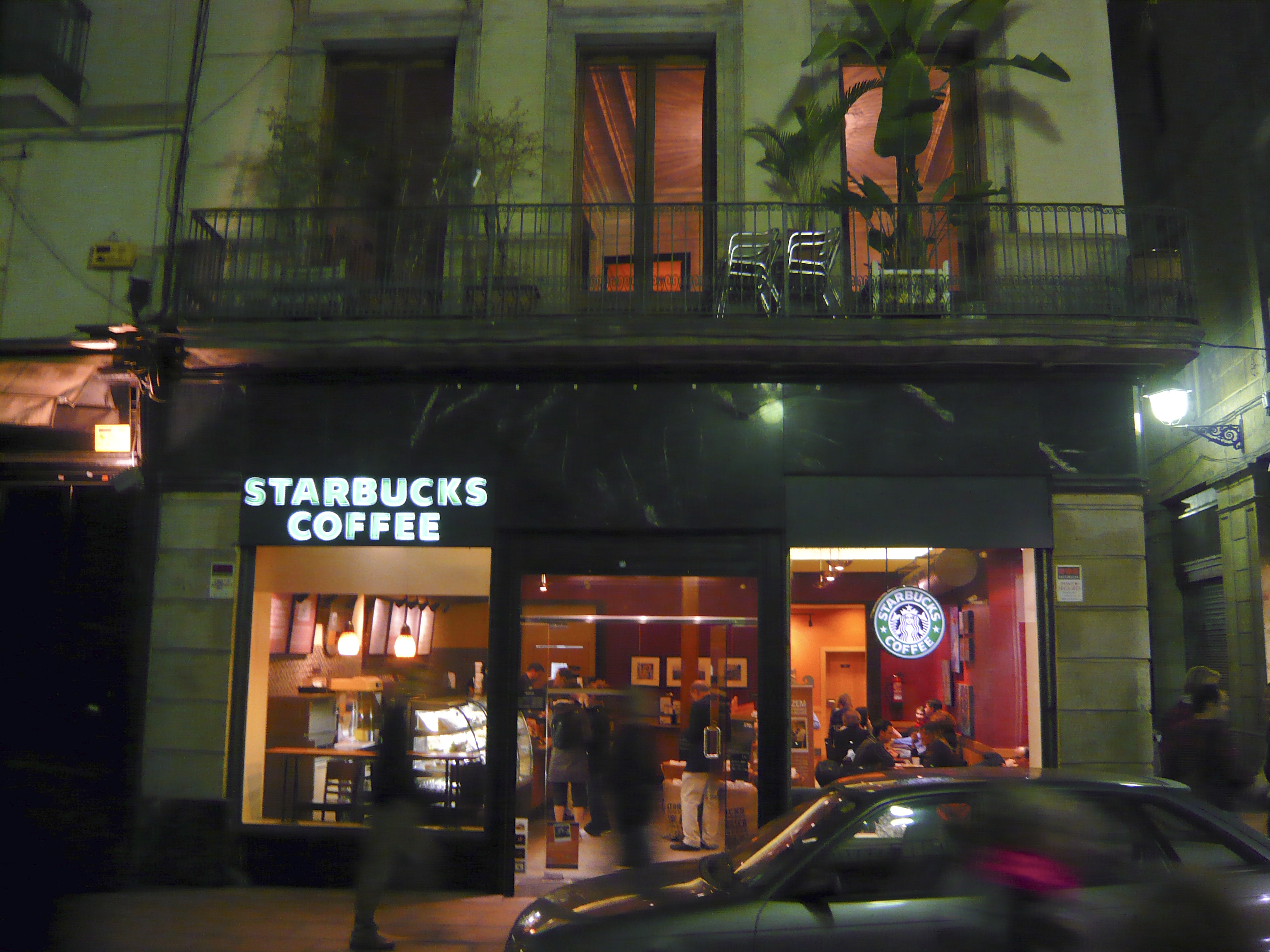 Starbucks